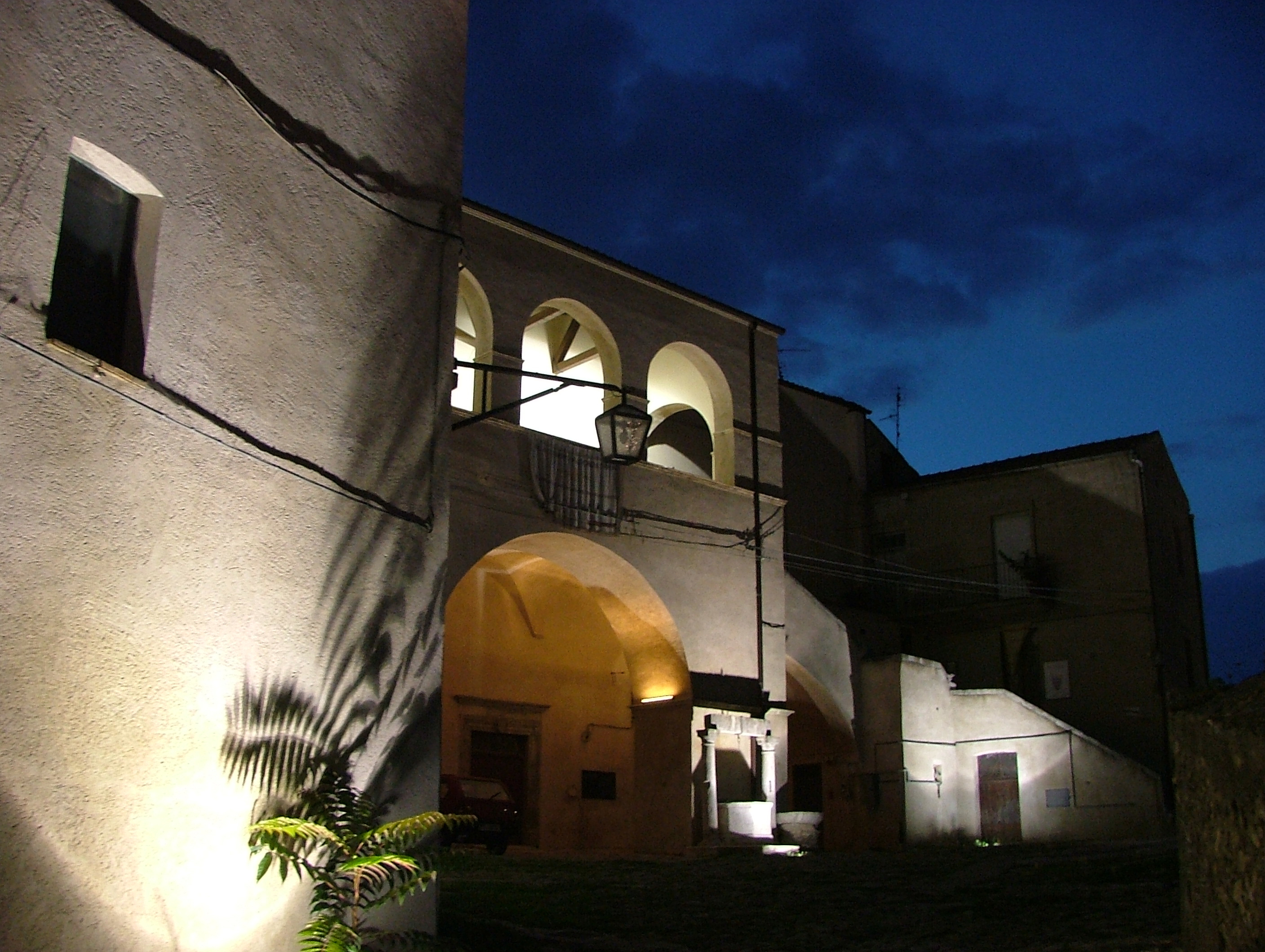 Palazzo ducale, Rocco Stasi